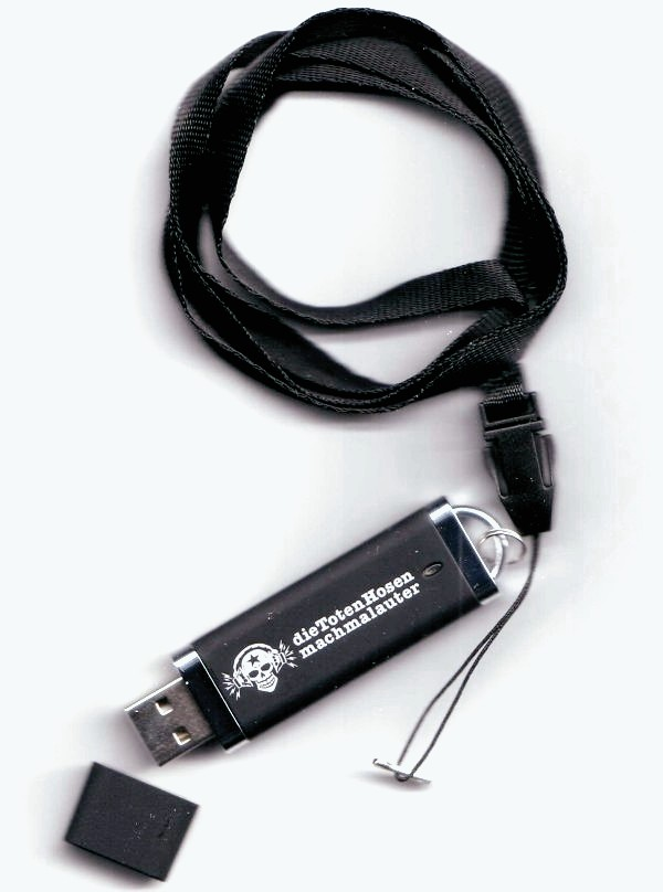 Scan eines Konzertsticks der Tour Machmalauter 2008 der Band Die Toten Hosen.